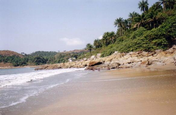 La plage du Gouverneur, Iles de Los, Guinea